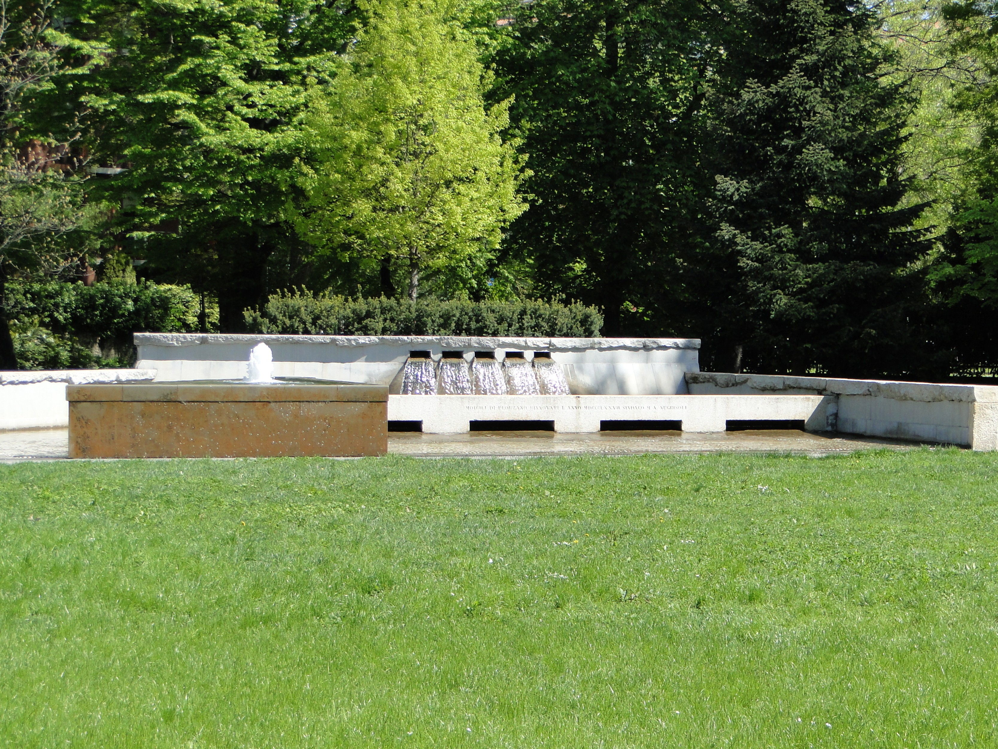 Fontana delle rogge, parco Suardi (Bergamo)